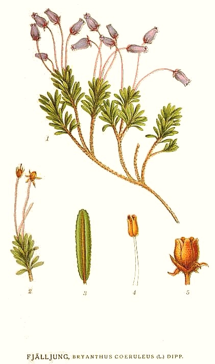 Fjälljung, Phyllodoce caerulea (L.) Bab. Original Description Fjälljung, Bryanthus coeruleus (L.) Dipp.